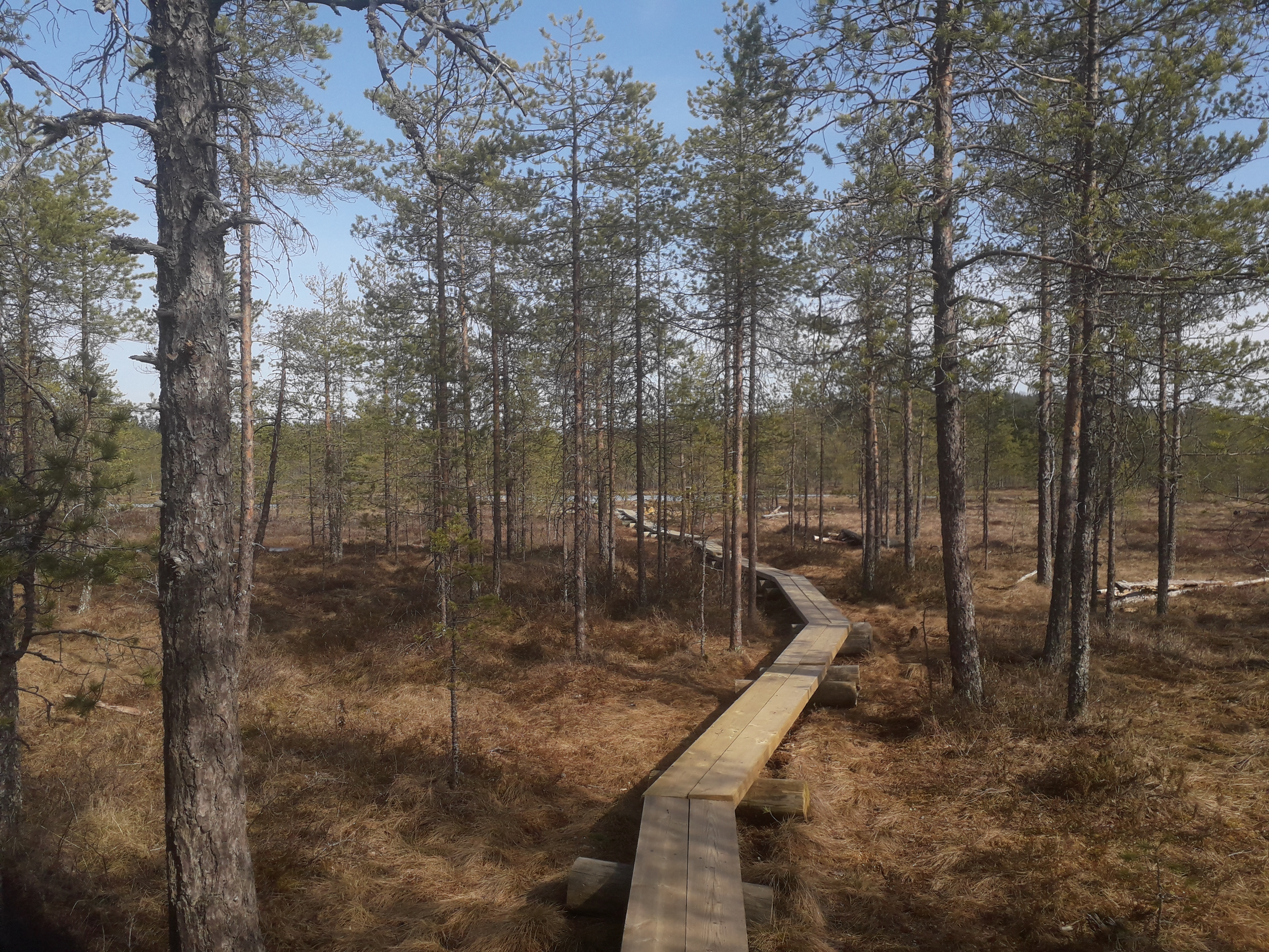 Luontoa Hatlamminsuolla.